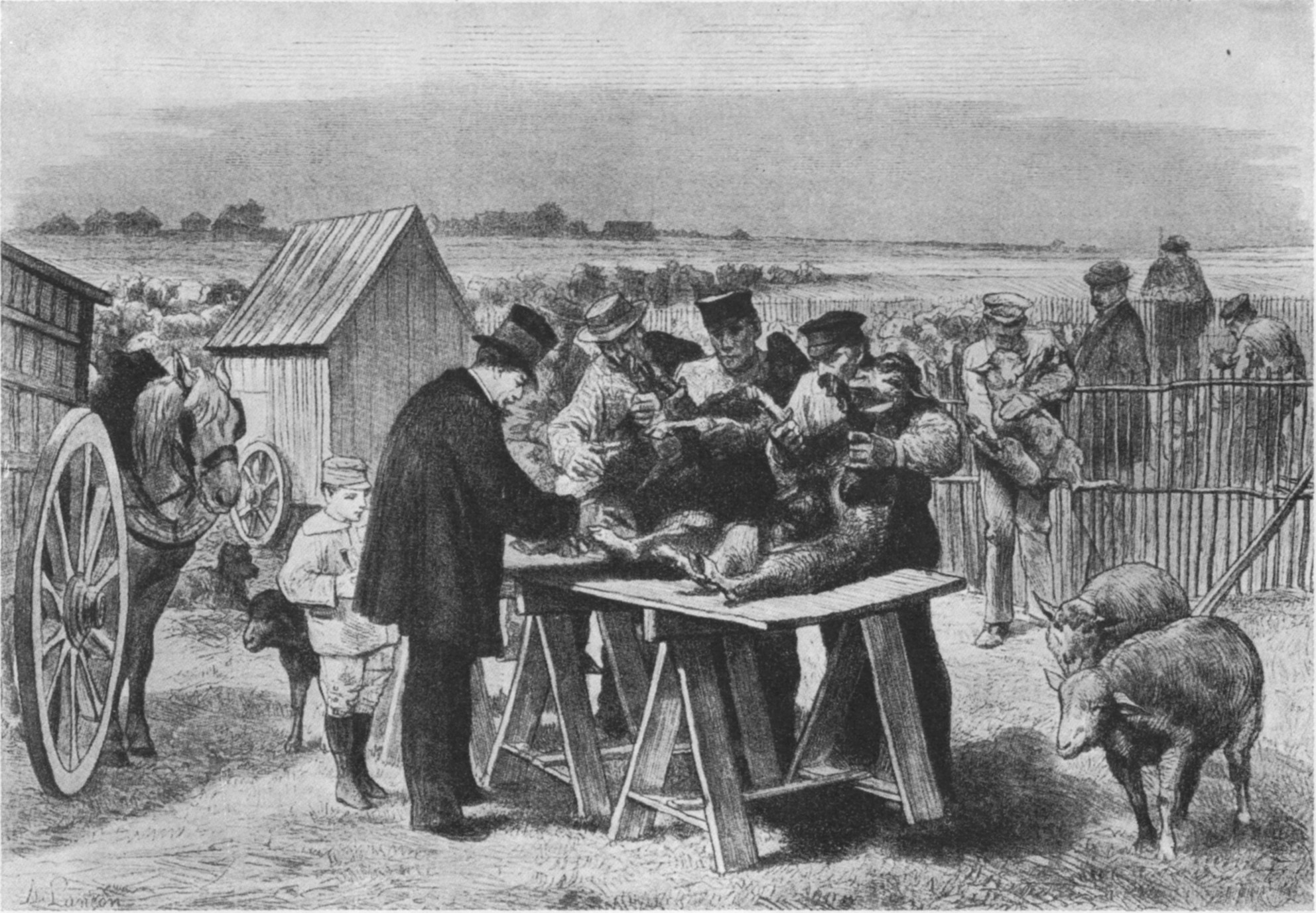 Louis Pasteur Schafimpfung in Pauly-le-Fort, 31.Mai.1881